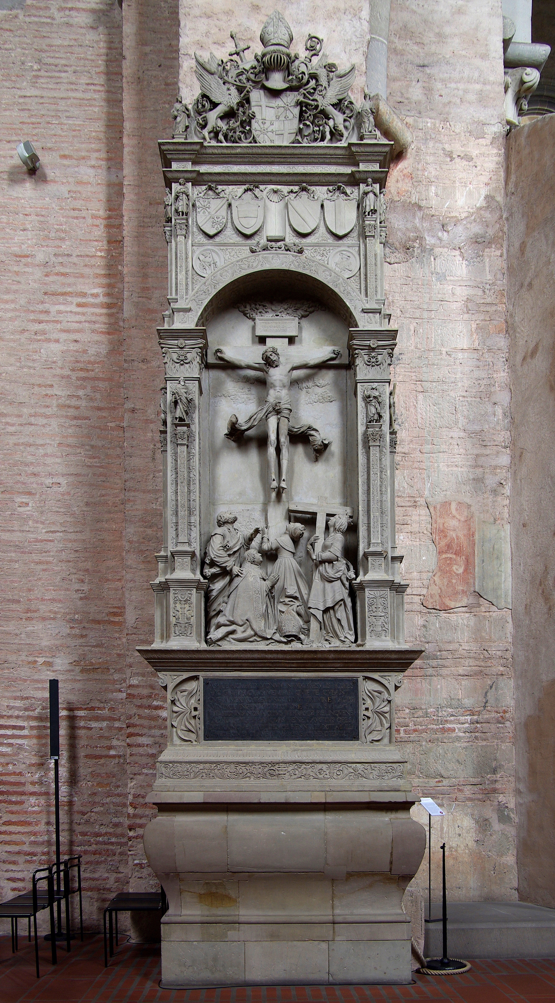 Trierer Dom, linkes Seitenschiff, Grabdenkmal Erzbischof Richard von Greiffenklau